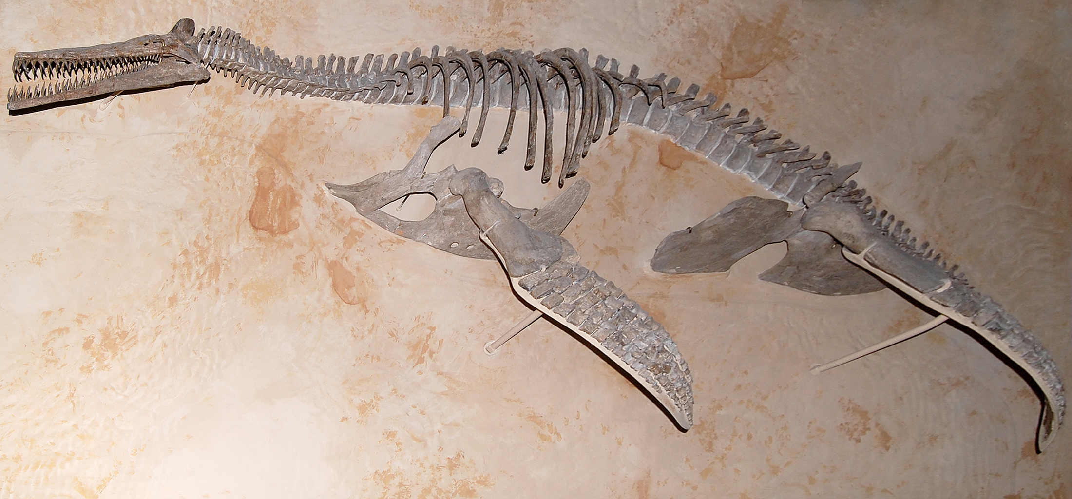 Dolichorhynchops osborni, Naturhistorisches Museum Wien